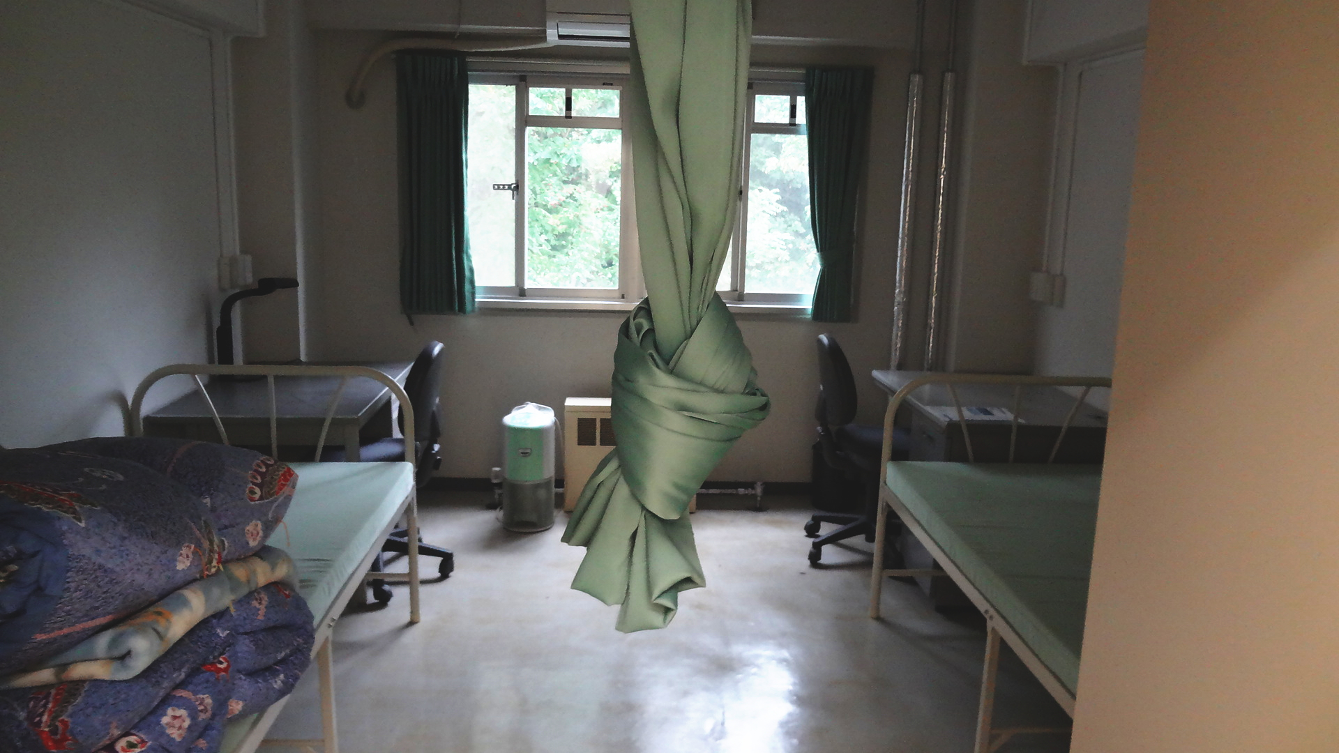 東京高専くぬぎだ寮第1棟室内